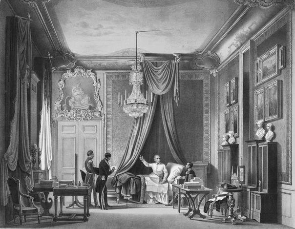 Förlaga till litografin är en målning av Carl Stefan Bennet från 1830-talet (i Kungl. slottet). Karl XIV Johan sätt att arbeta i och regera från sängkammaren kom att benämnas Sängkammarregementet.